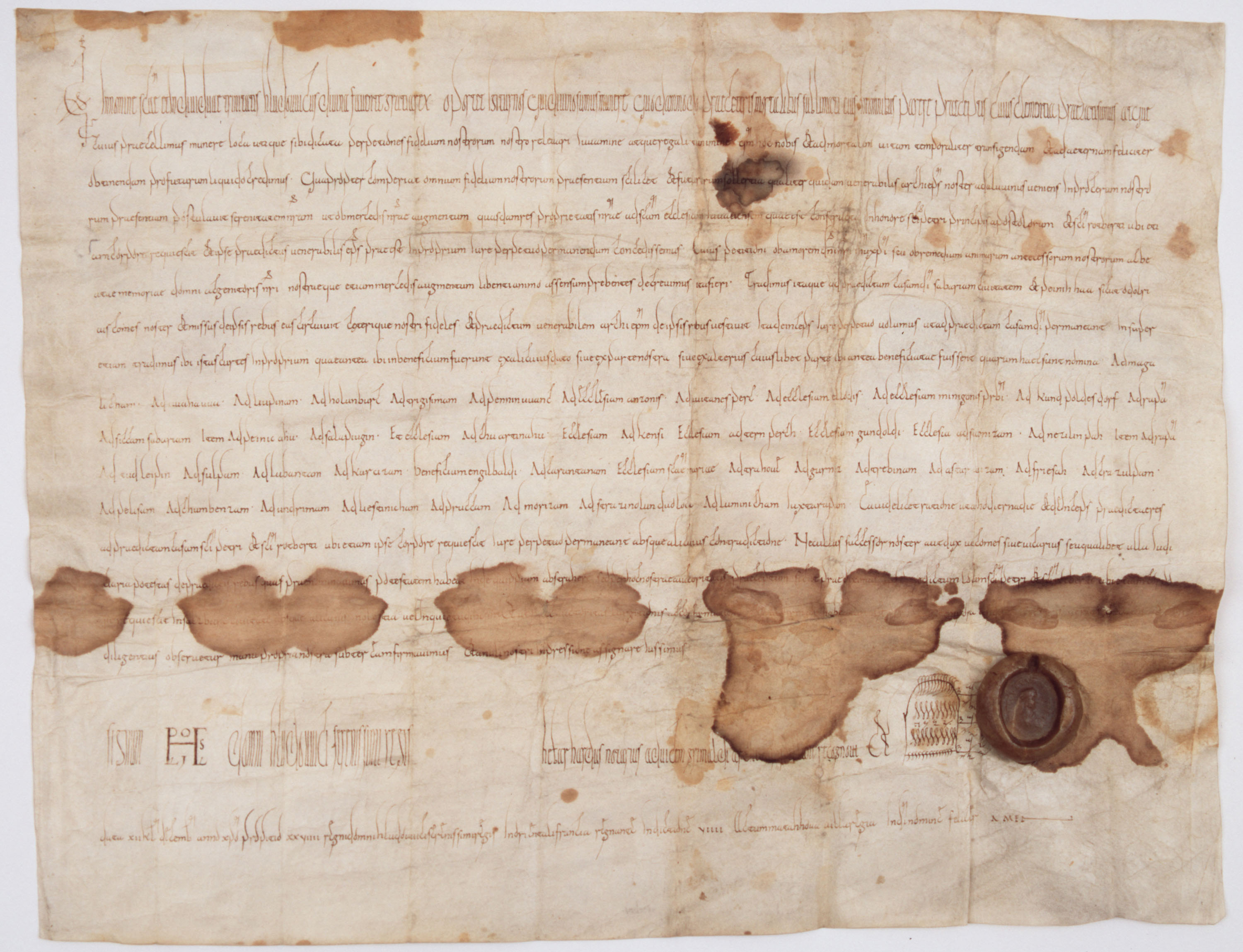 König Ludwig der Deutsche schenkt der Erzdiözese Salzburg auf Bitte des Erzbischofs Adalwin 24 Güter des Baierischen Ostlandes, die diese bisher als Lehen vom König inne hatte.